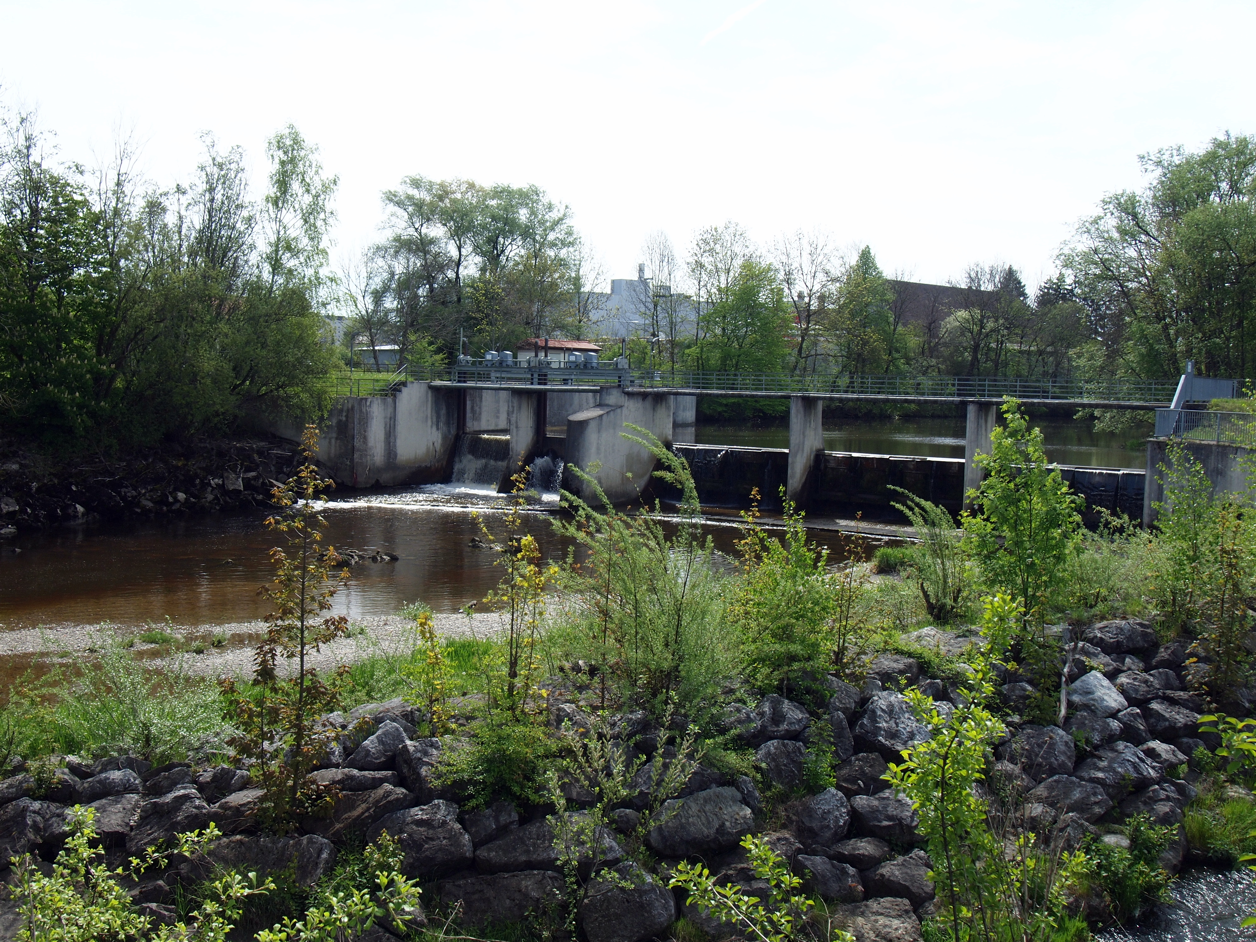 Kolbwehr in Kaufbeuren, Abzweig des 1,7 km langen Wertachgraben zum Wasserkraftwerk Leinau, im Vordergrund die 2006 gebaute Fischaufstiegshilfe